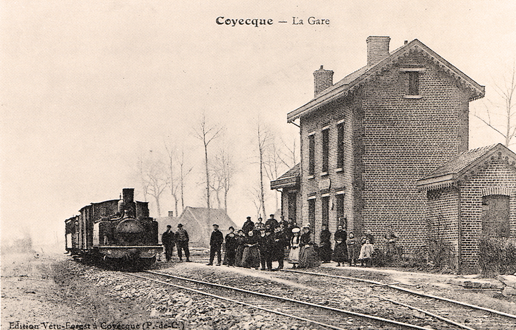 La gare de Coyecques (Pas-de-Calais) sur la ligne d'Aire-sur-la-Lys à Berck-Plage)